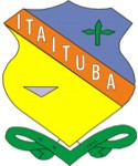 Brasao do Municipio de Itaituba